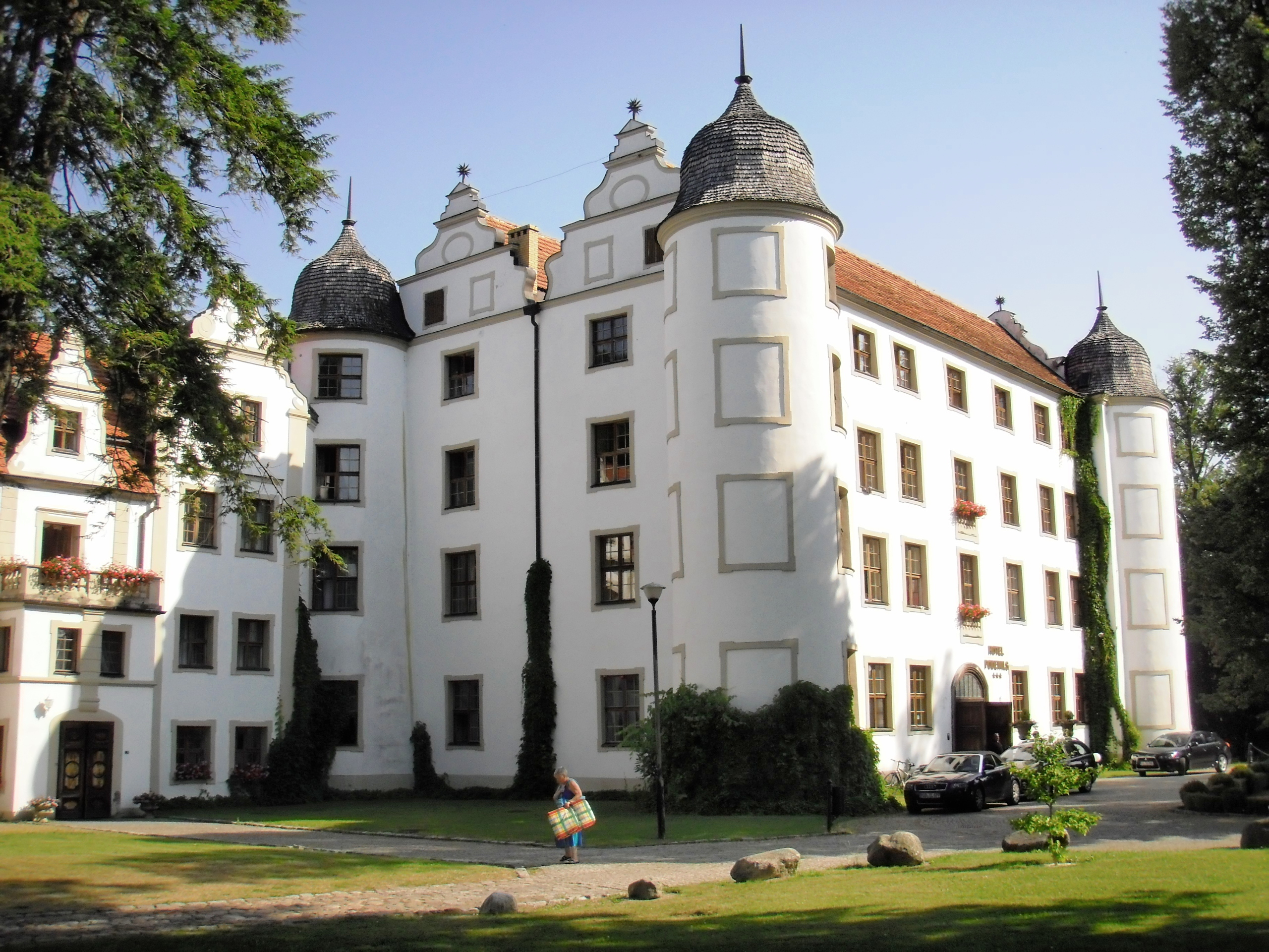 Krąg - zamek (dec. dwór obronny), kon. XV w., 1580, 1650, 1898-1899, obecnie hotel